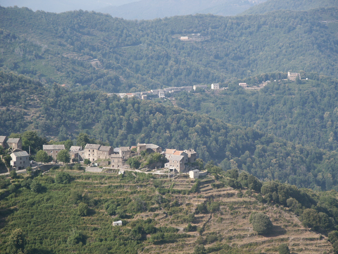 Stoppia Nova et Ghjucatoghju, villages de Castagniccia, Corse, Corsica